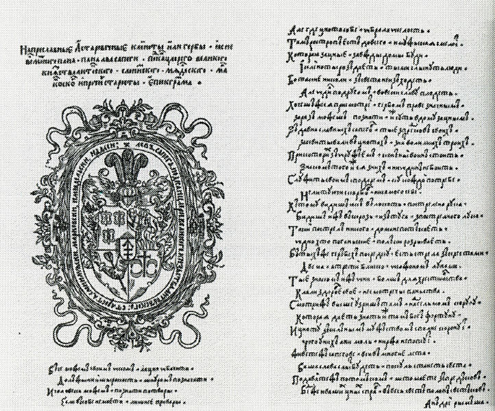 Панэгірык Андрэя Рымшы на герб Л. Сапегі, надрукаваны ў Статуце 1588 г. Беларуская (тарашкевіца): Панэгірык Андрэя Рымшы на герб Л. Сапегі, надрукаваны ў Статуце 1588 г.